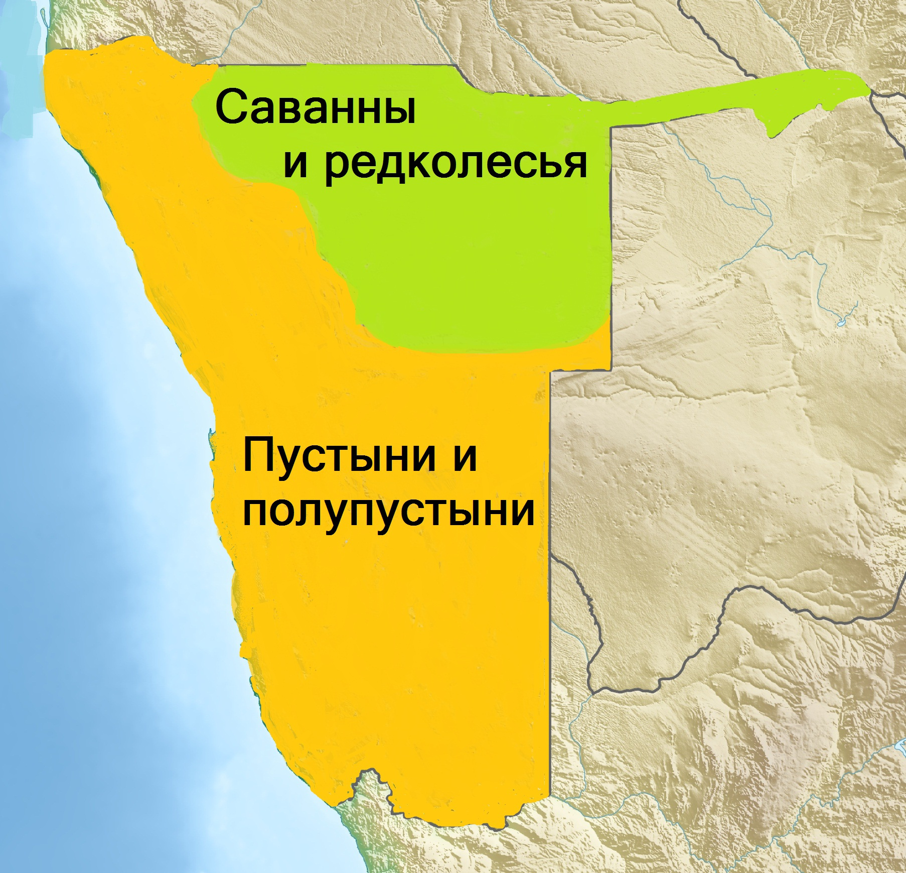 Природные зоны Намибии